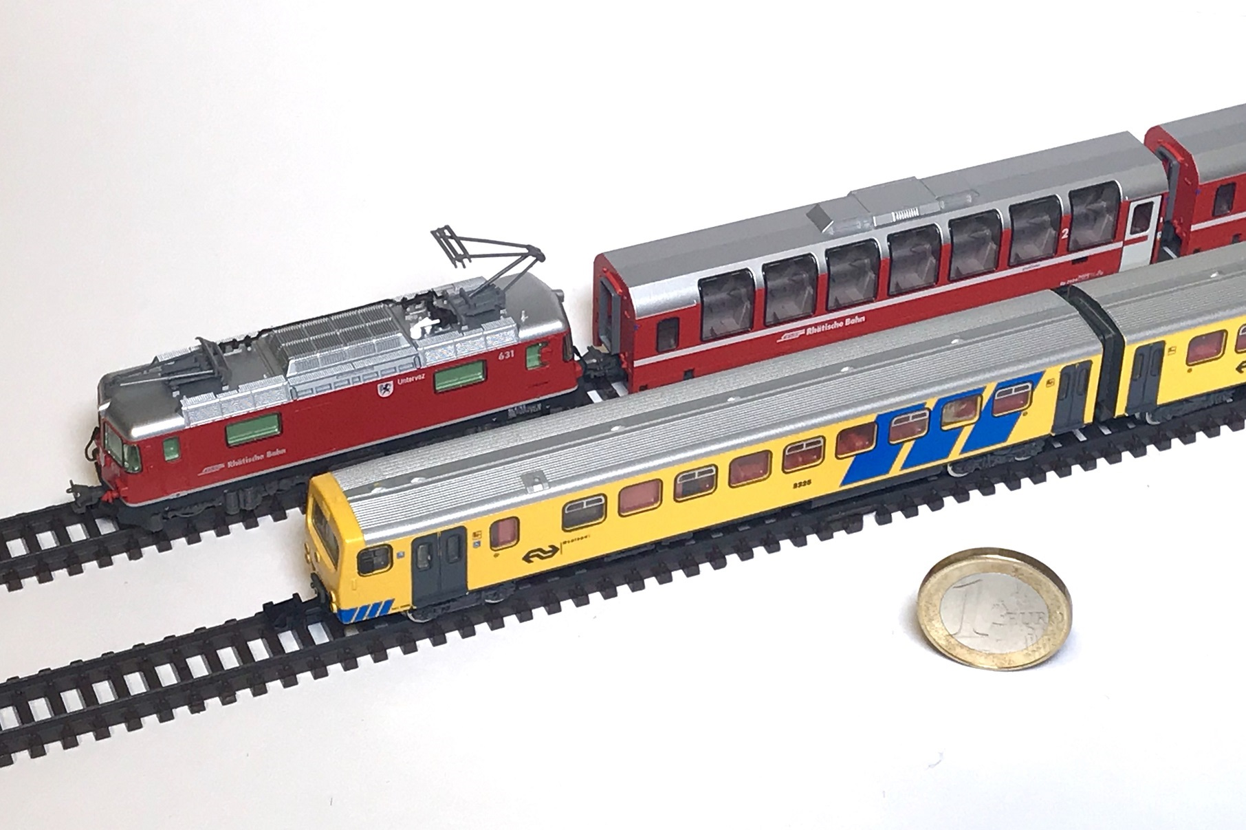 Vorne NS DH2 Dieseltriebzug Wattläufer, niederländisch: Wadloper, gelb mit drei blauen Querstreiffen von Fleischmann im Massstab 1:160. Hinten RhB Ge 4/4 II und für den Bernina Express bestimmten Panoramawagen von KATO im Maßstab 1:150. Beide für die Spur N mit einer Modellspurweite von 9 mm. Auf dem Bild eine Ein-Euro-Münze zum Grössenvergleich.